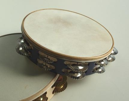 Hau pandero bat da.